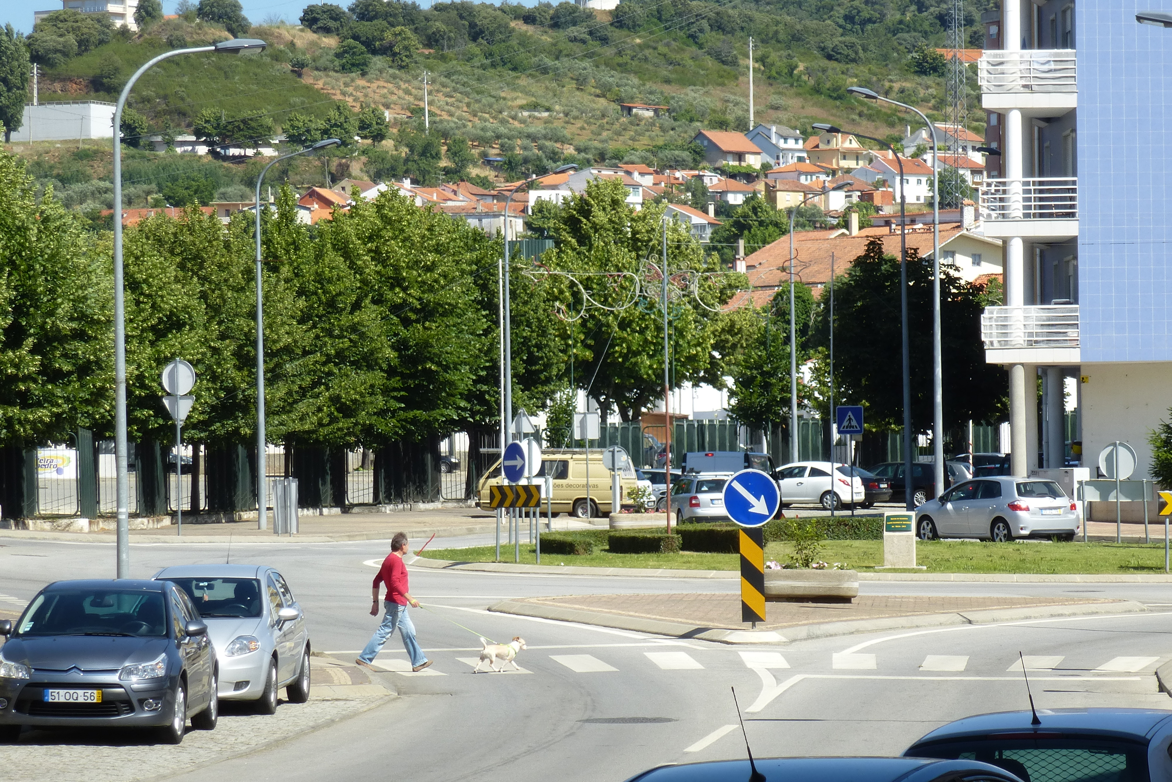 Rua de Macedo de Cavaleiros